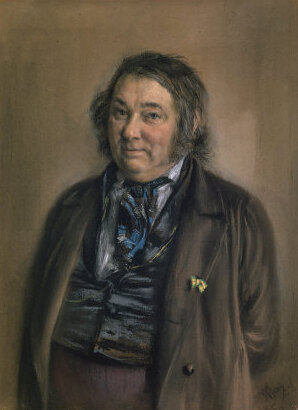 German author Heinrich Smidt (1798–1867).